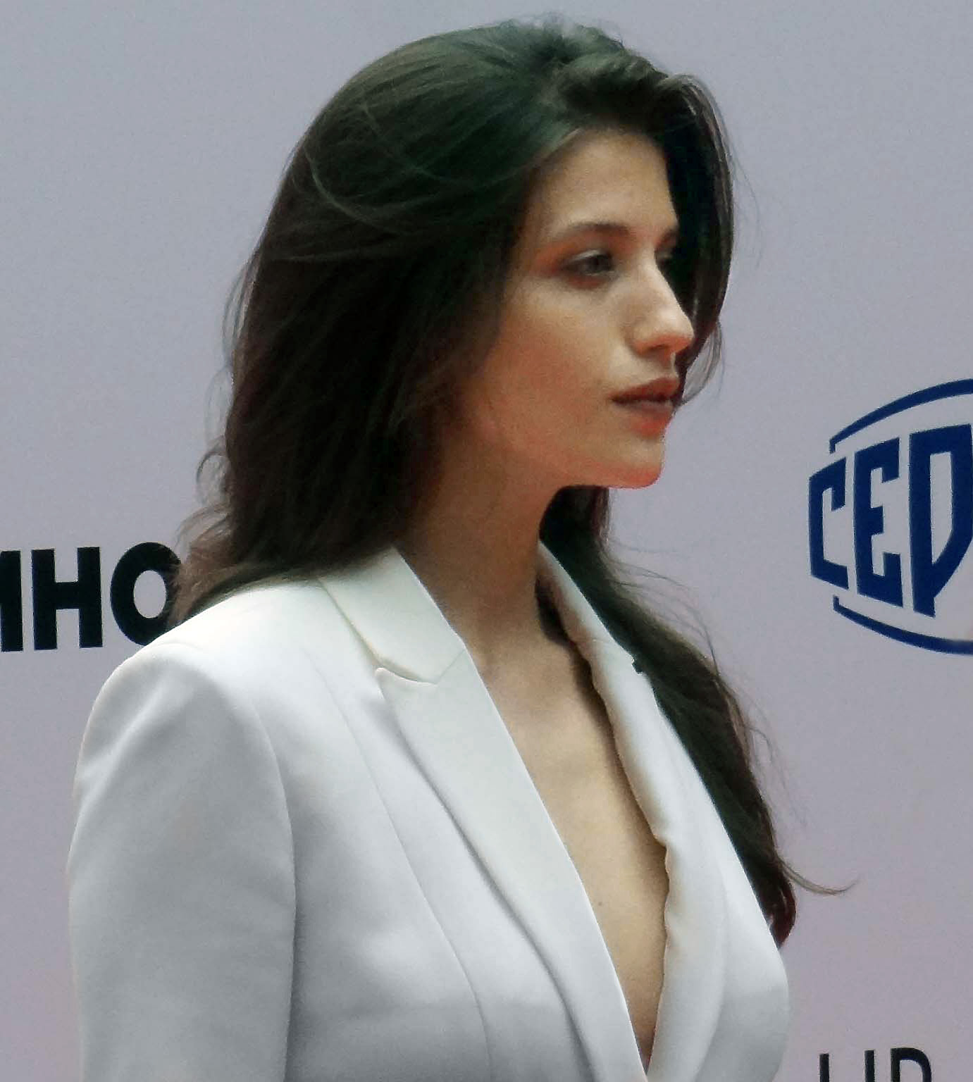 Анна Борисовна Чиповская — российская актриса театра, кино и телевидения. Сочи (2015).